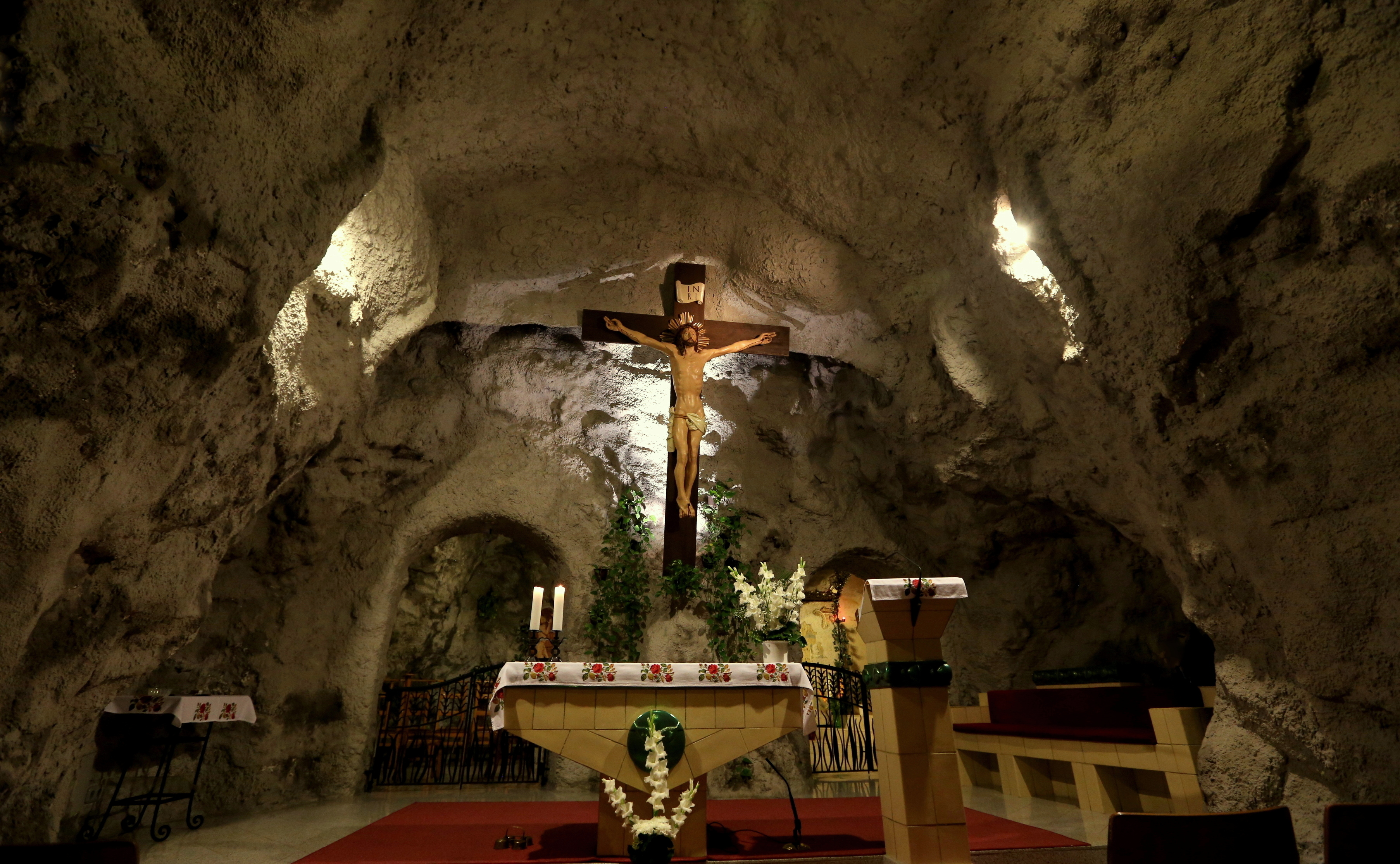 A Szent Gellért-sziklatemplom főoltára Budapesten